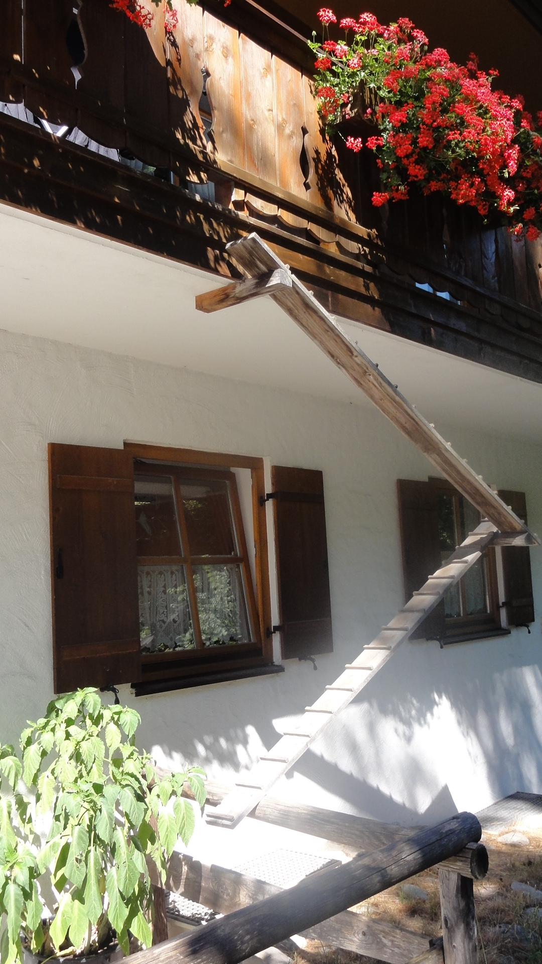 Germany, Bayern, Landkreis Berchtesgadener Land, Schönau am Königssee, Untersteinerstr. 10